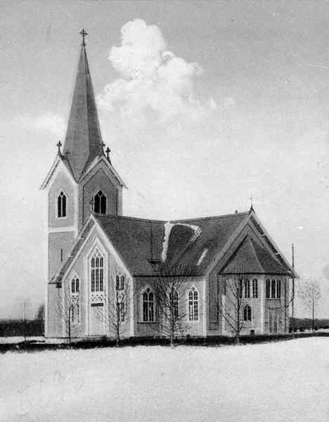 Kyrkan från sydöst. Snabbinv. Kategori: (01) ExteriörerKyrkan från sydöst. Snabbinv.